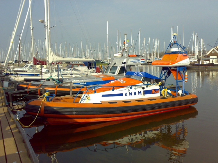 De MARTIJN KOENRAAD HOF en de ALIDA van de KNRM in Hindelopen